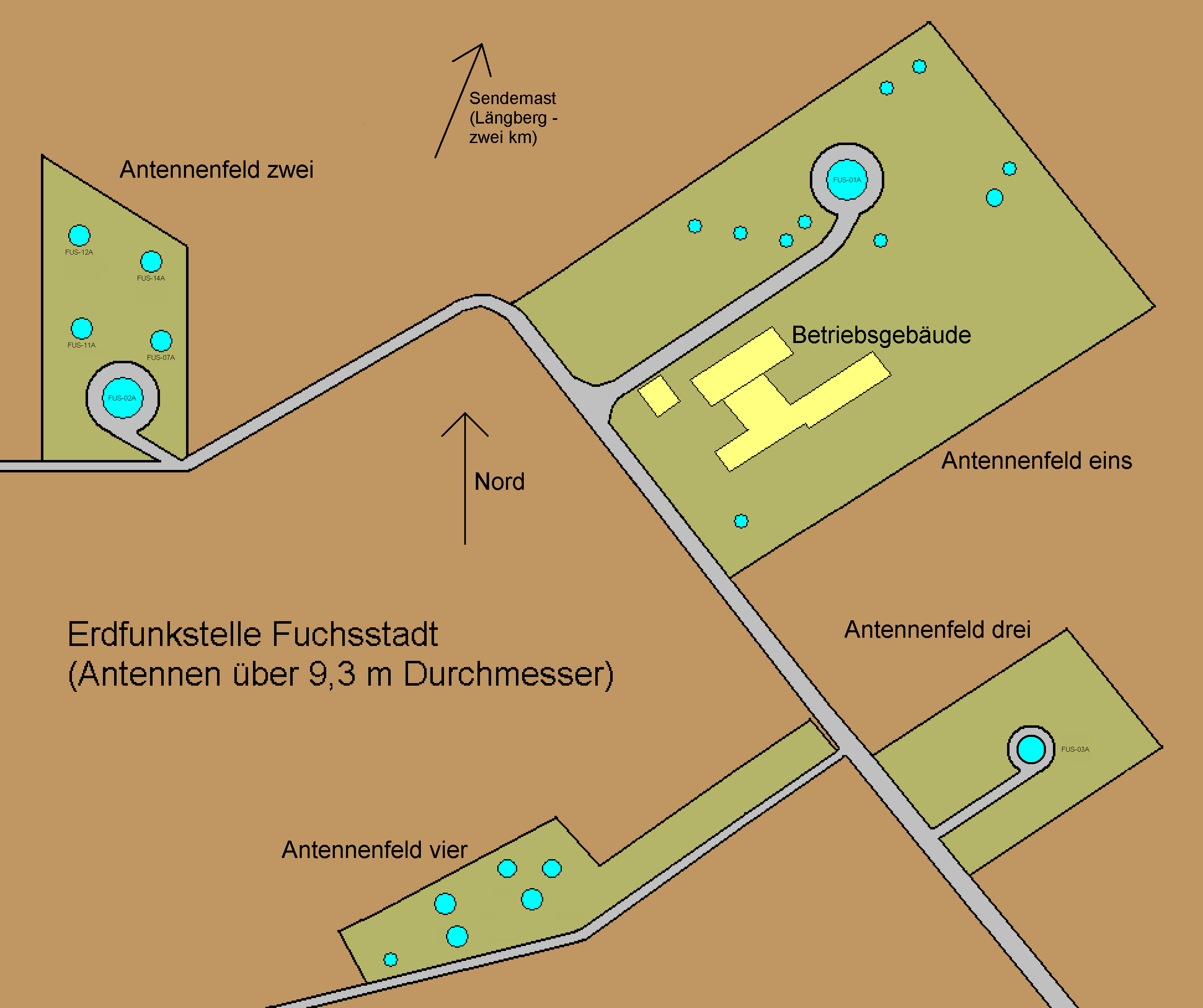 Satellite ground station Fuchsstadt, Deutschland, outline